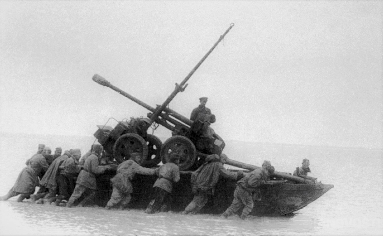 Сапёры капитана Ф.С.Булатова переправляют артиллерию через Сиваш. Фёдор Самуилович Булатов - командир 57-го отдельного штурмового иженерного сапёрного батальона 12-й штурмовой инженерной сапёрной бригады РГК